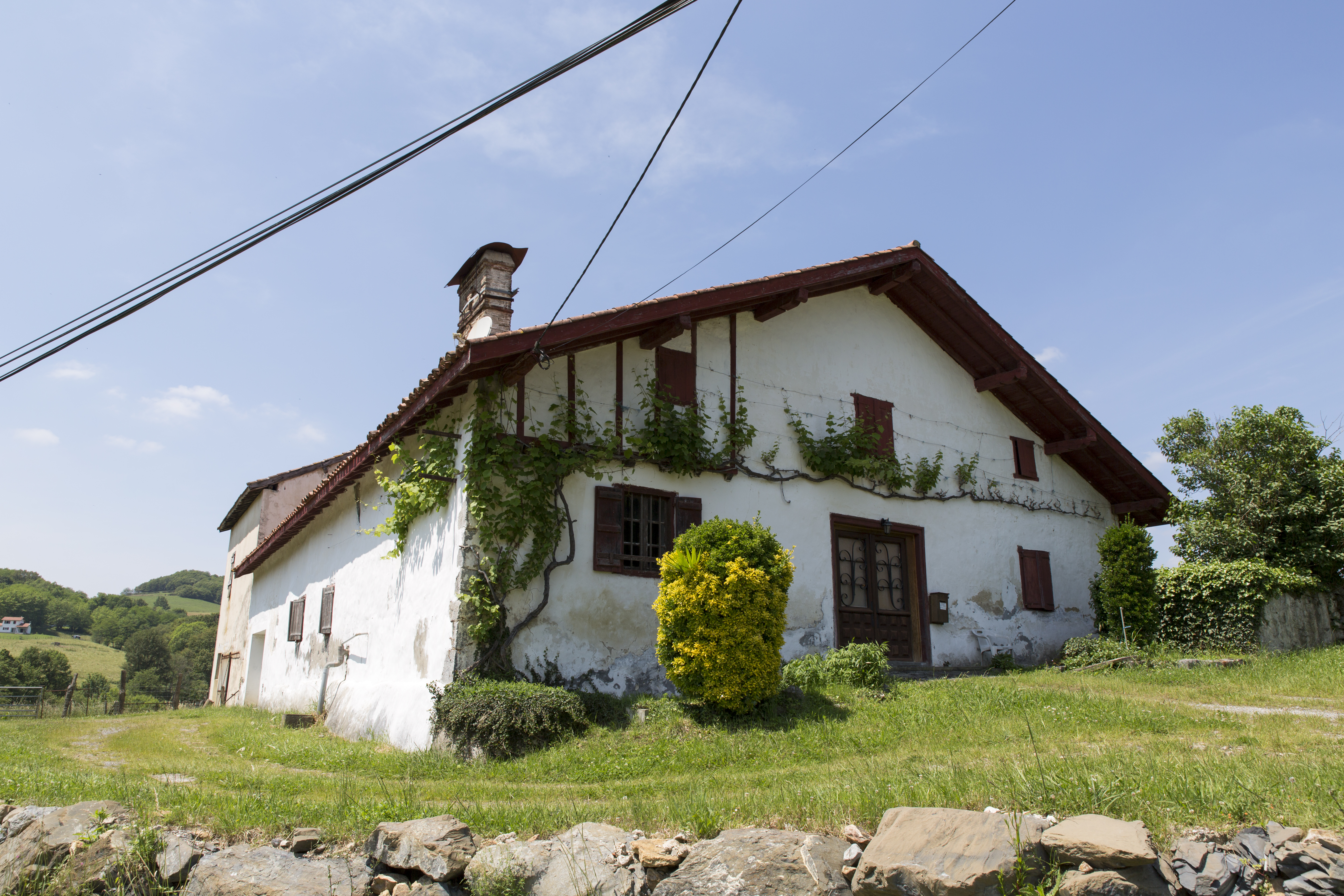 Maison traditionnelle